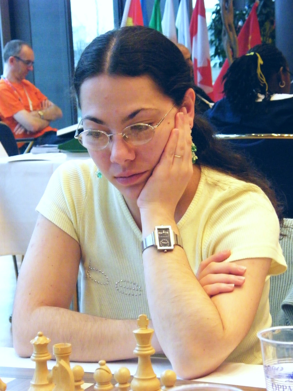 Marisa Zuriel bei der 38. Schacholympiade in Dresden 2008